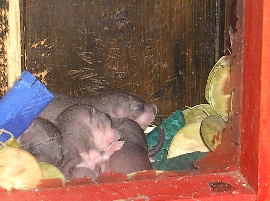 Siebenschlaefer (Glis glis), Nest mit Jungtiere deren Augen noch geschlossen sind. Nest befindet sich in einem Gartenhaus zwischen Fenster und Fensterladen.